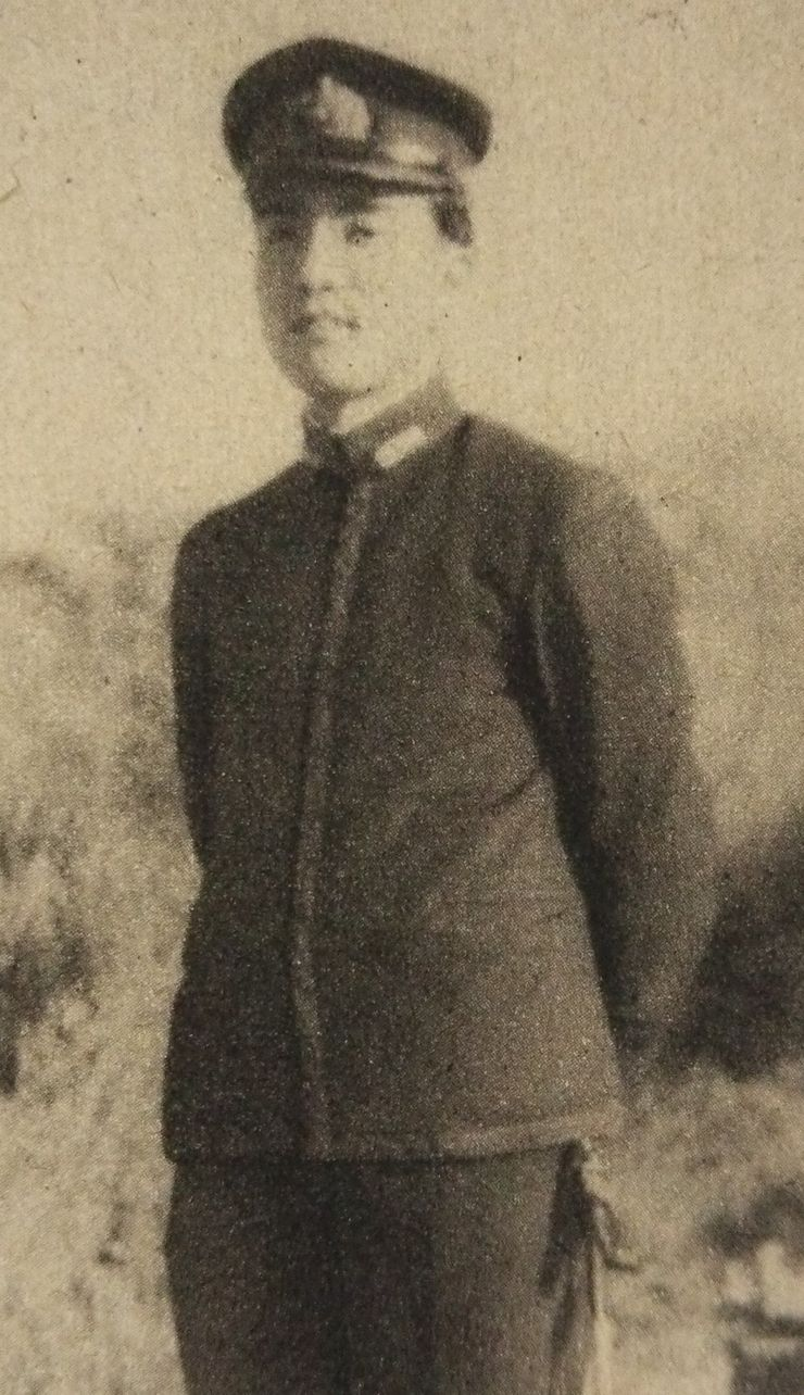 従軍時代の中曽根康弘